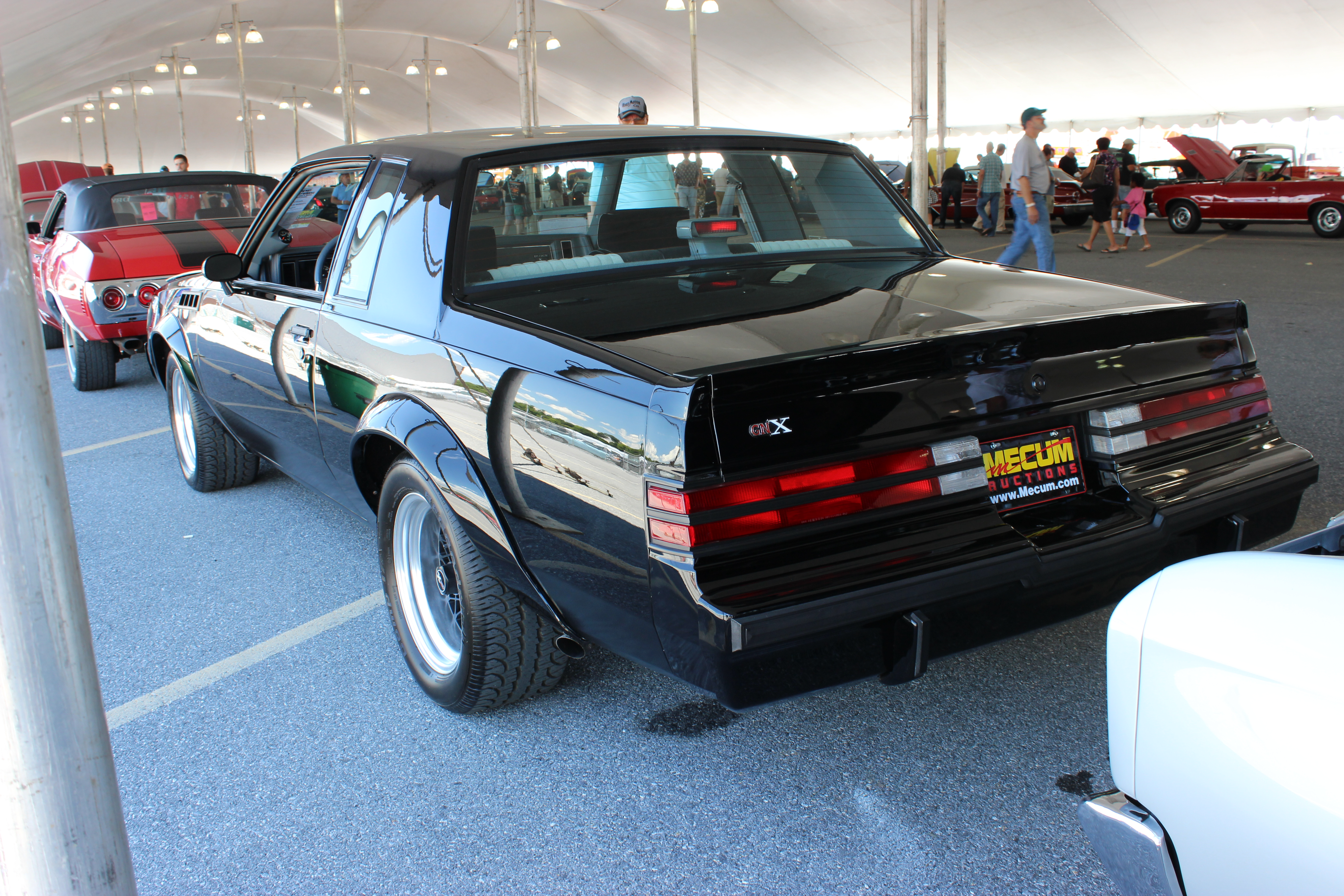 Buick GNX